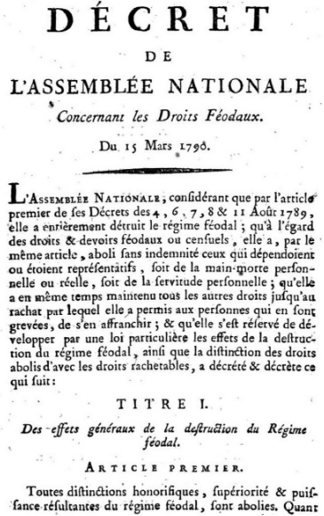 DÉCRET DE L'ASSEMBLÉE NATIONALE Concernant les Droits Féodaux. Du 15 Mars 1790. À Paris, chez BAUDOUIN, Imprimeur de l'ASSEMBLÉE NATIONALE, rue du Foins S. Jacques, n°31 Décret du 15 mars 1790 portant sur l'abolition des privilèges (abolition du régime féodal)